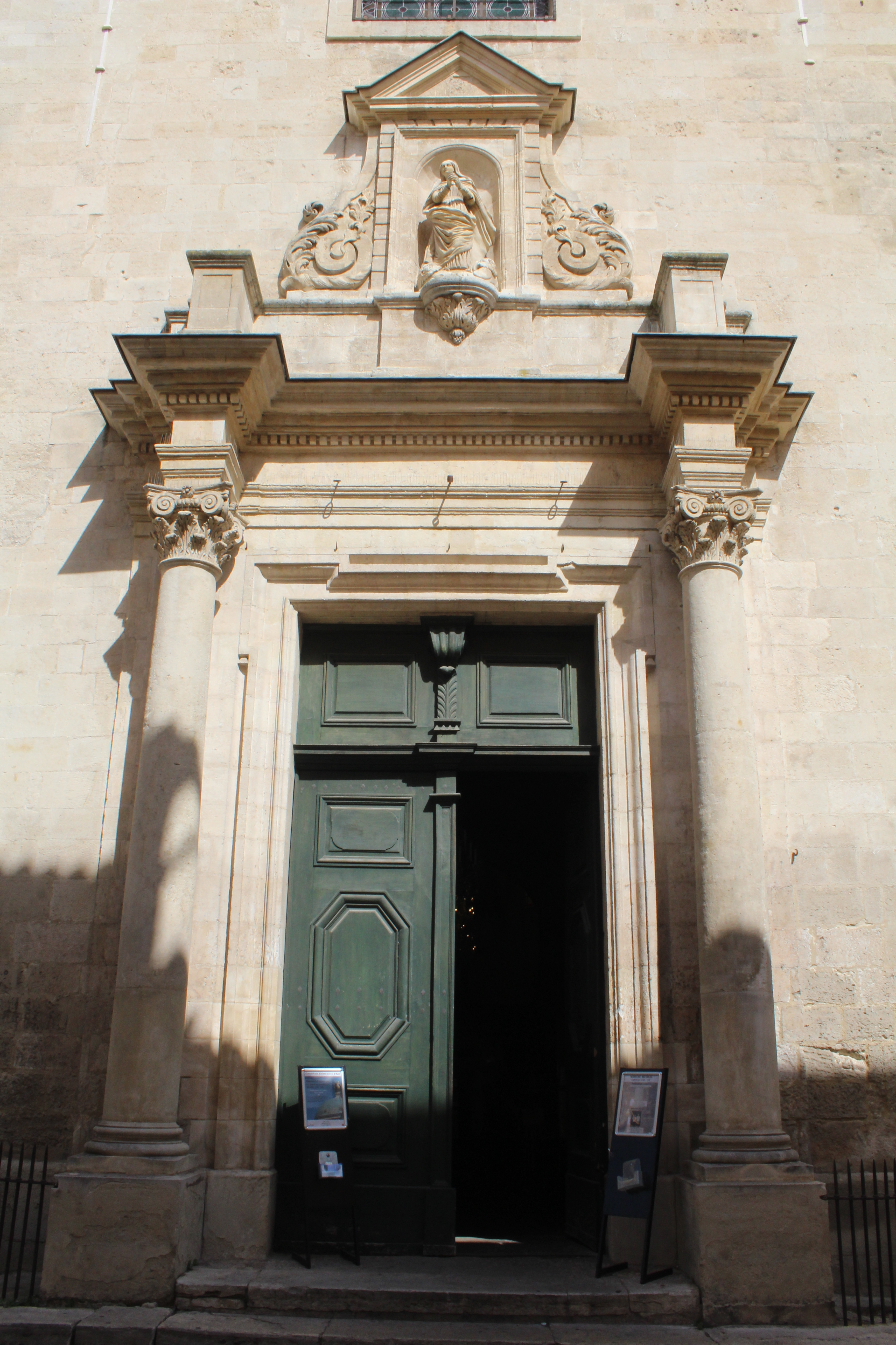 Cathédrale Sainte-Anne d'Apt.